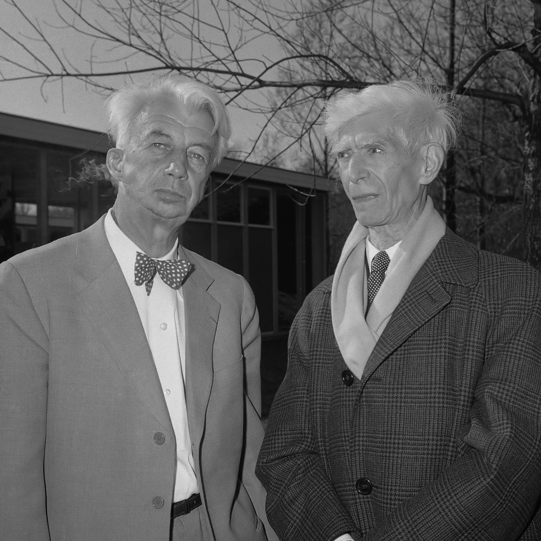 Willem Sandberg (l) (oud-directeur Stedelijk Museum) en beeldhouwer Ossip Zadkine (m) bij de opening van de beeldententoonstelling t.g.v. 100 jaar Vondelpark. 1 april 1965